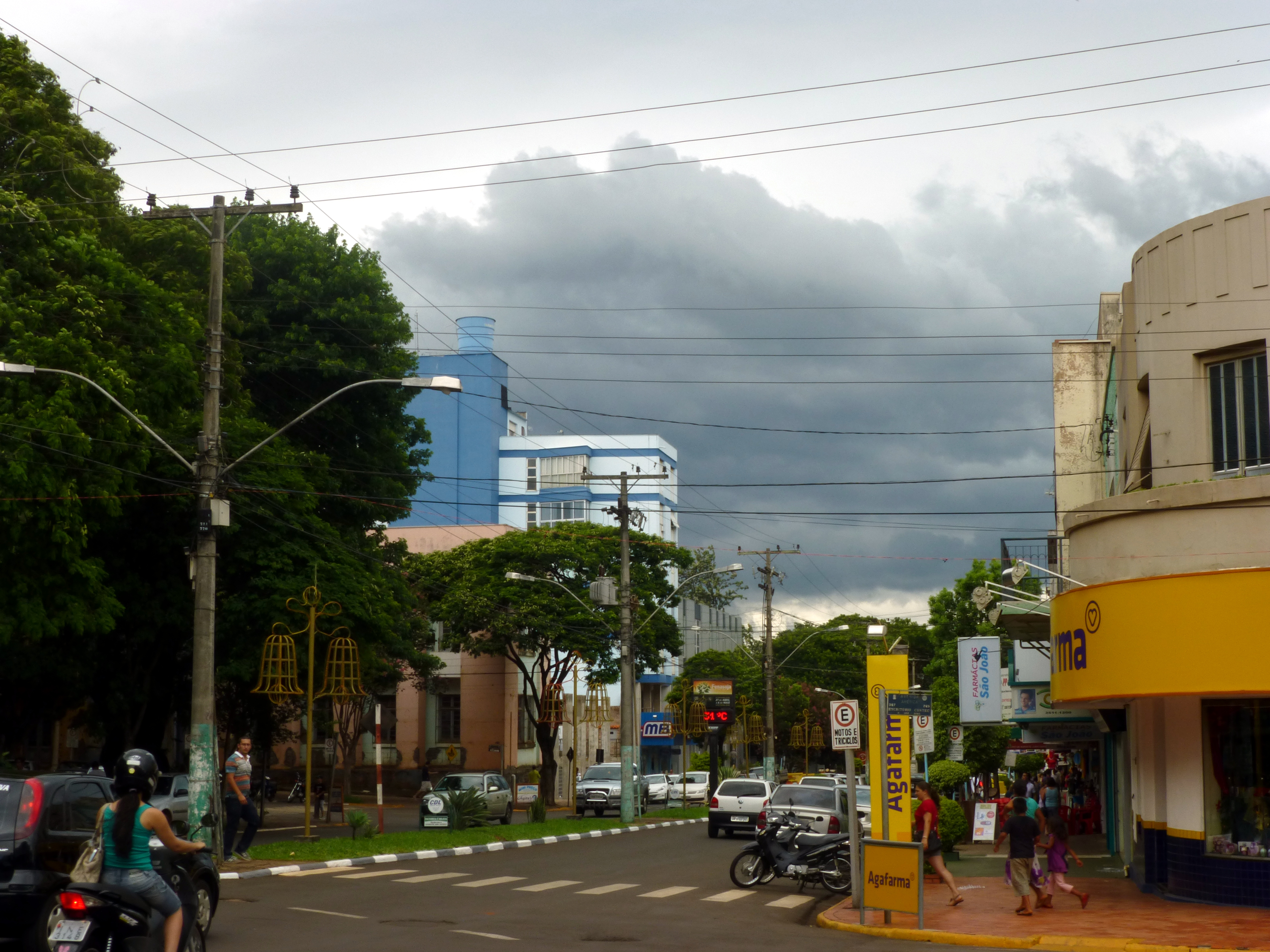 Tempestad acercándose a la ciudad de Santa Rosa, Rio Grande do Sul, Brasil.